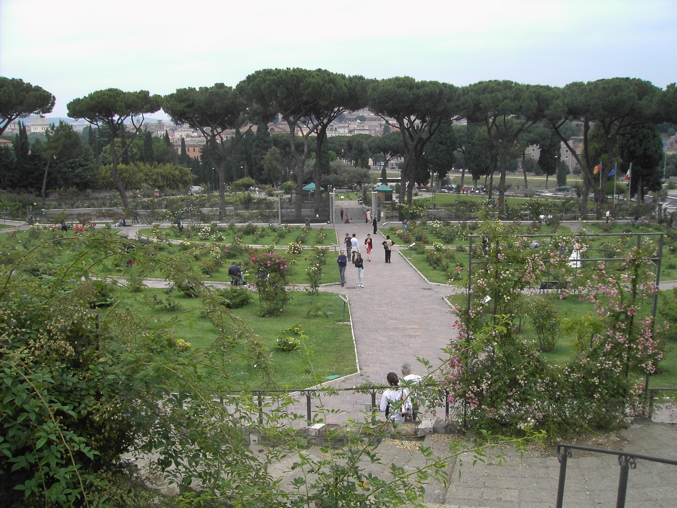 Roma, Roseto comunale all'Aventino (rione Ripa). I vialetti disegnano una menorah, in memoria dell'antico cimitero ebraico ivi esistente.